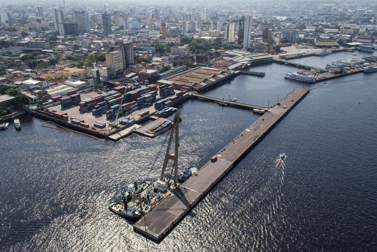 Área portuária de Manaus, Amazonas.